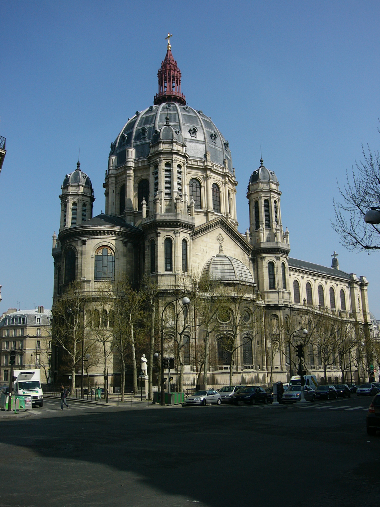 Eglise saint augustin a Paris